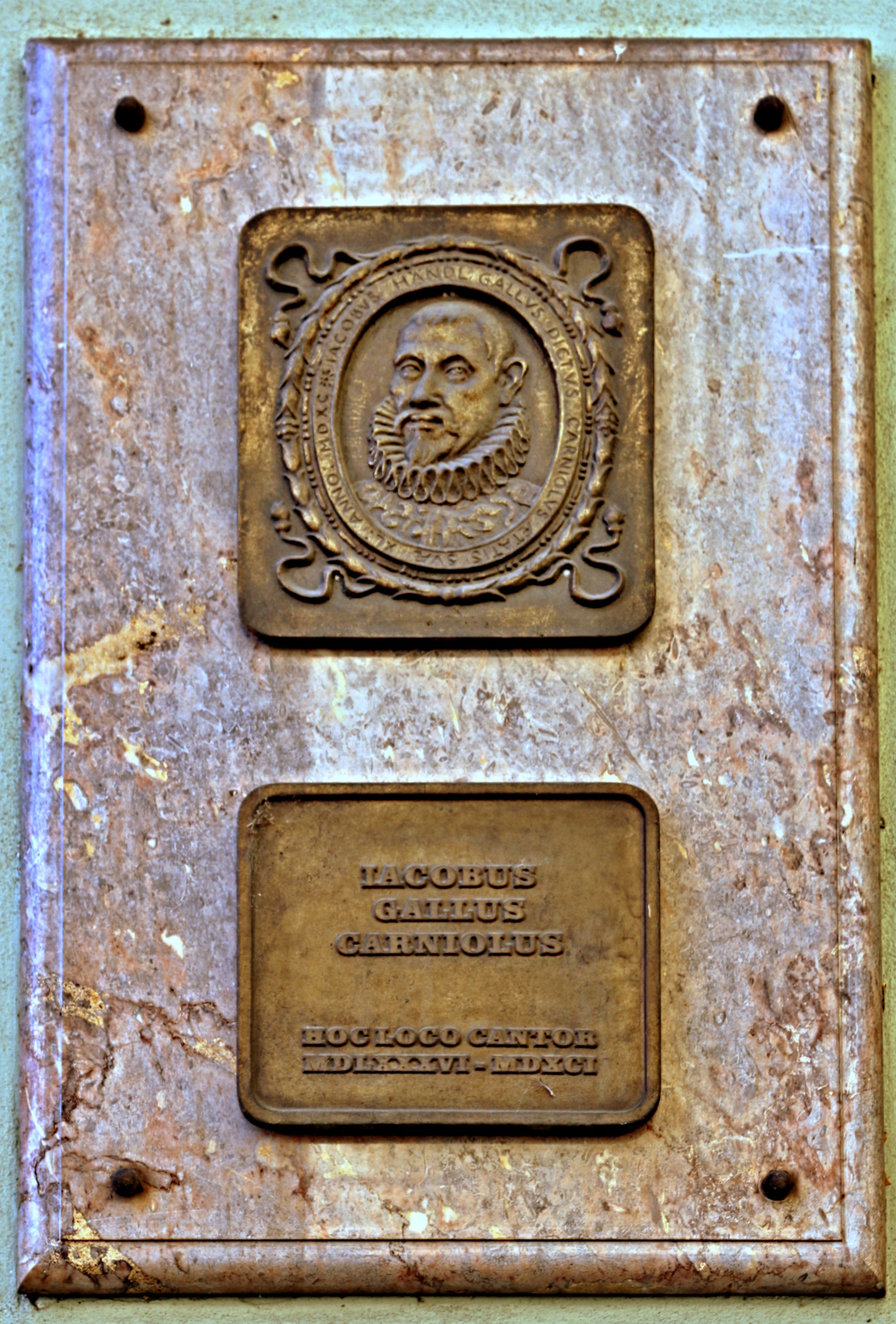 Anenské námětí